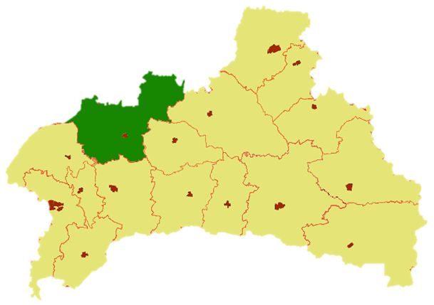 Pružanský rajón v rámci Brestské oblasti